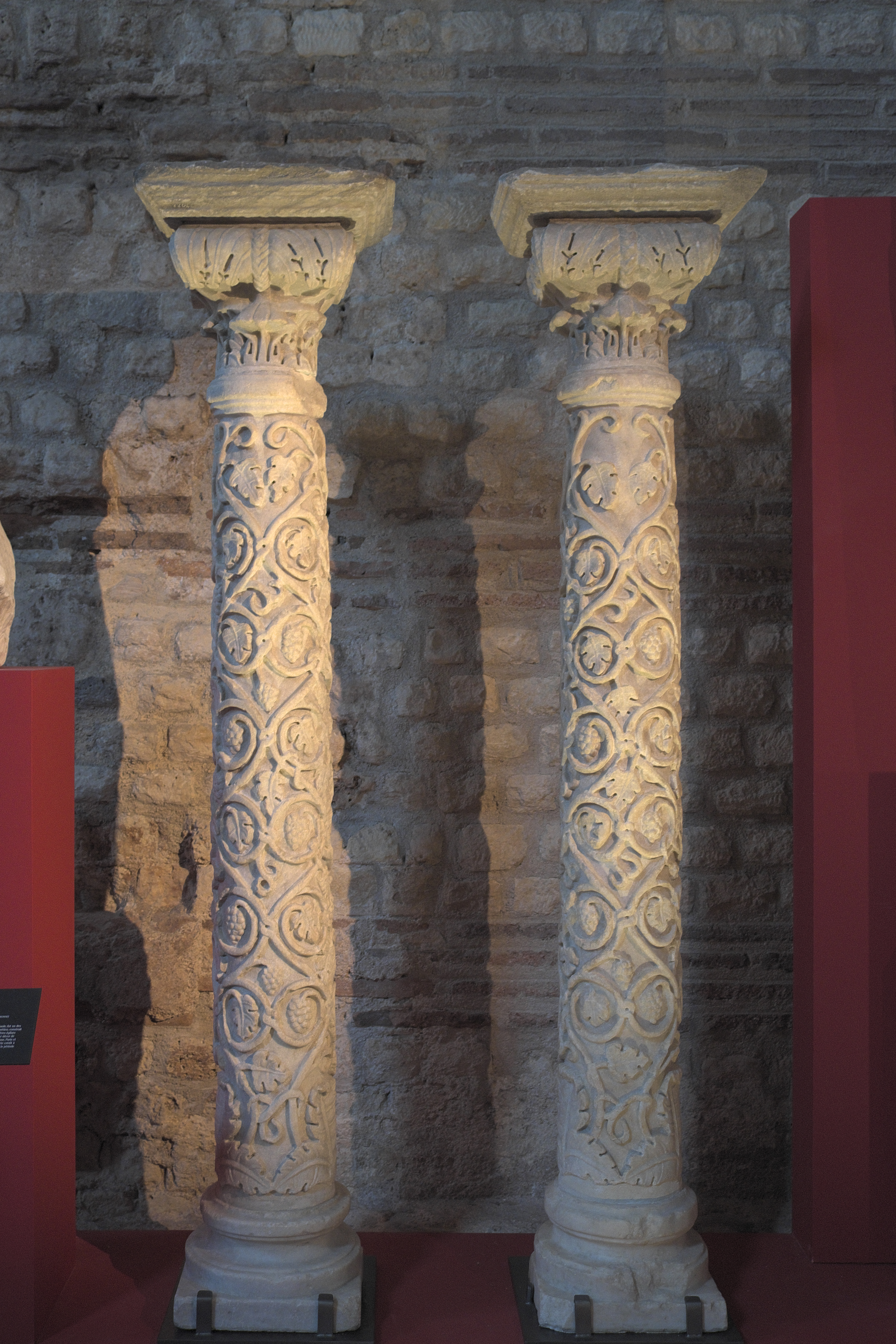 Musée national du Moyen Âge (Musée de Cluny) im 5. Arrondissement in Paris, Ausstellung: Les Temps mérovingiens; Säulen aus dem späten 5. Jahrhundert (Musée du Louvre), aus der Kirche Sainte-Croix et Saint-Vincent